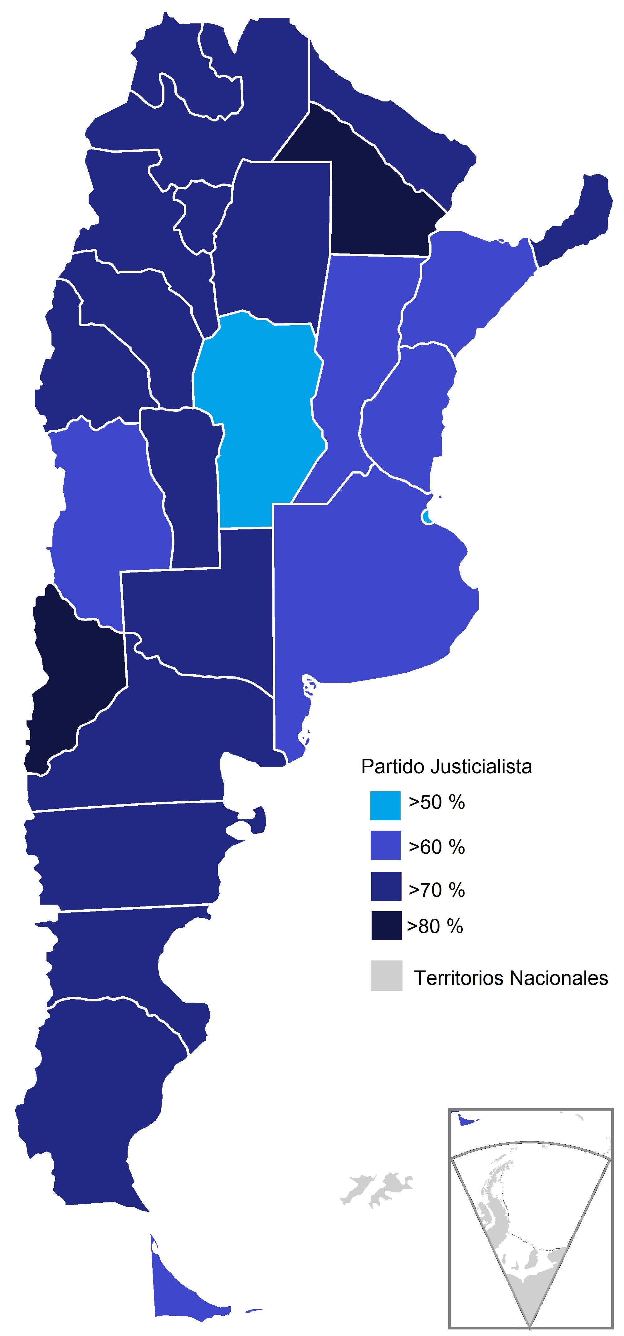 Mapa de las elecciones presidenciales de Argentina de 1951. Perón triunfó en todas las provincias.